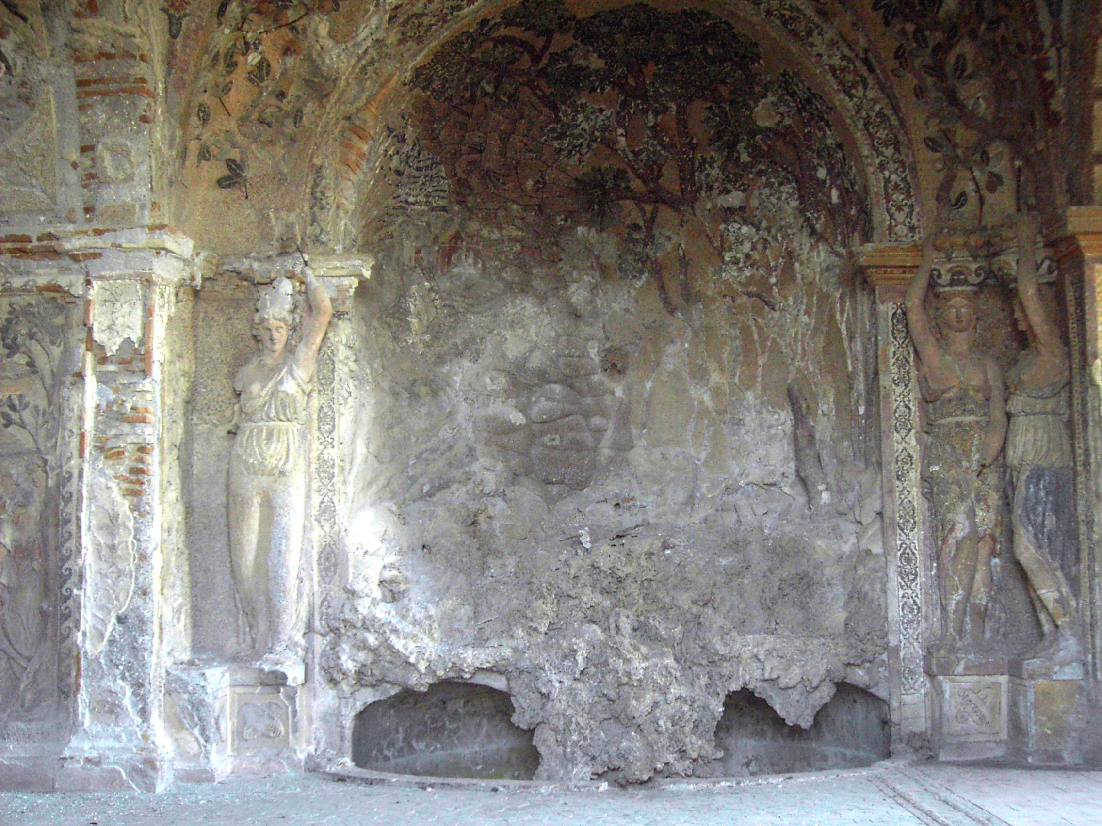 Tivoli, Villa d'Este, la Grotta di Diana